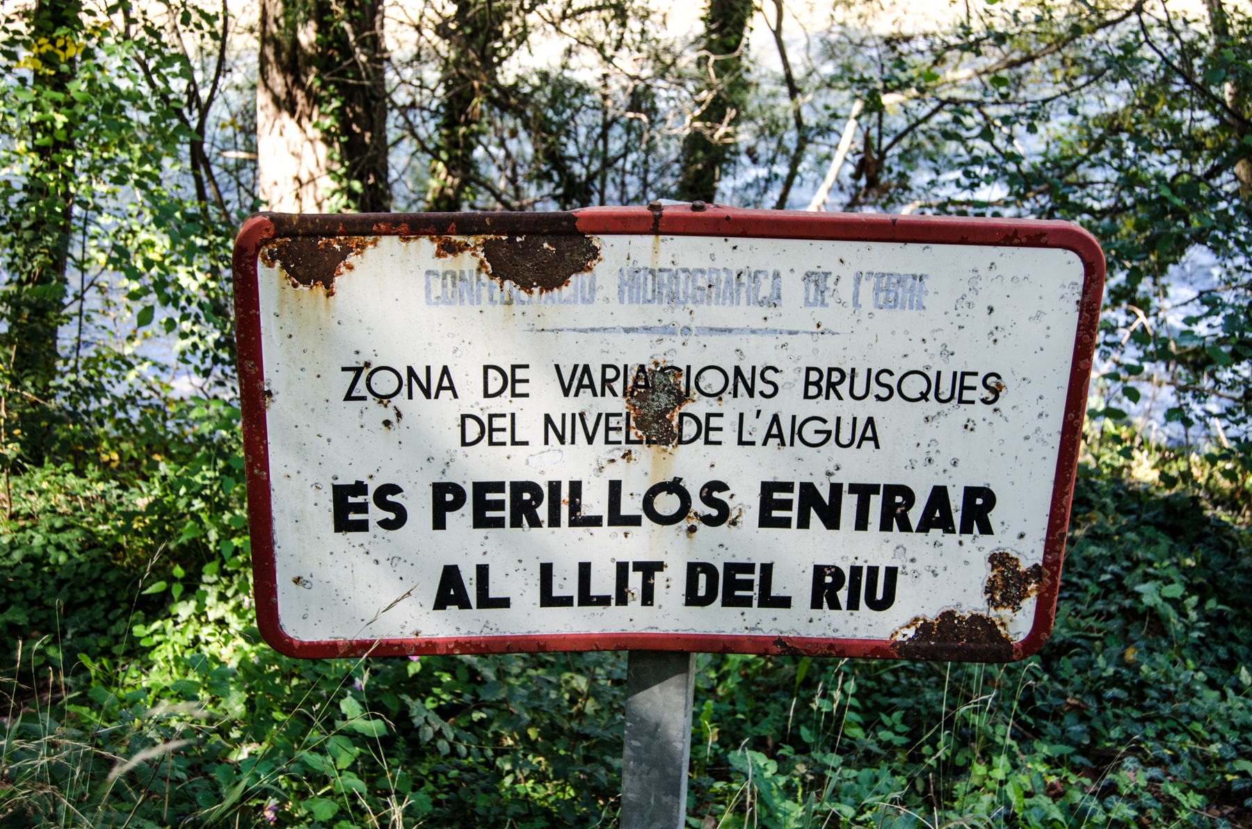 El Pont de Claverol. Señal frente al río Noguera Pallaresa